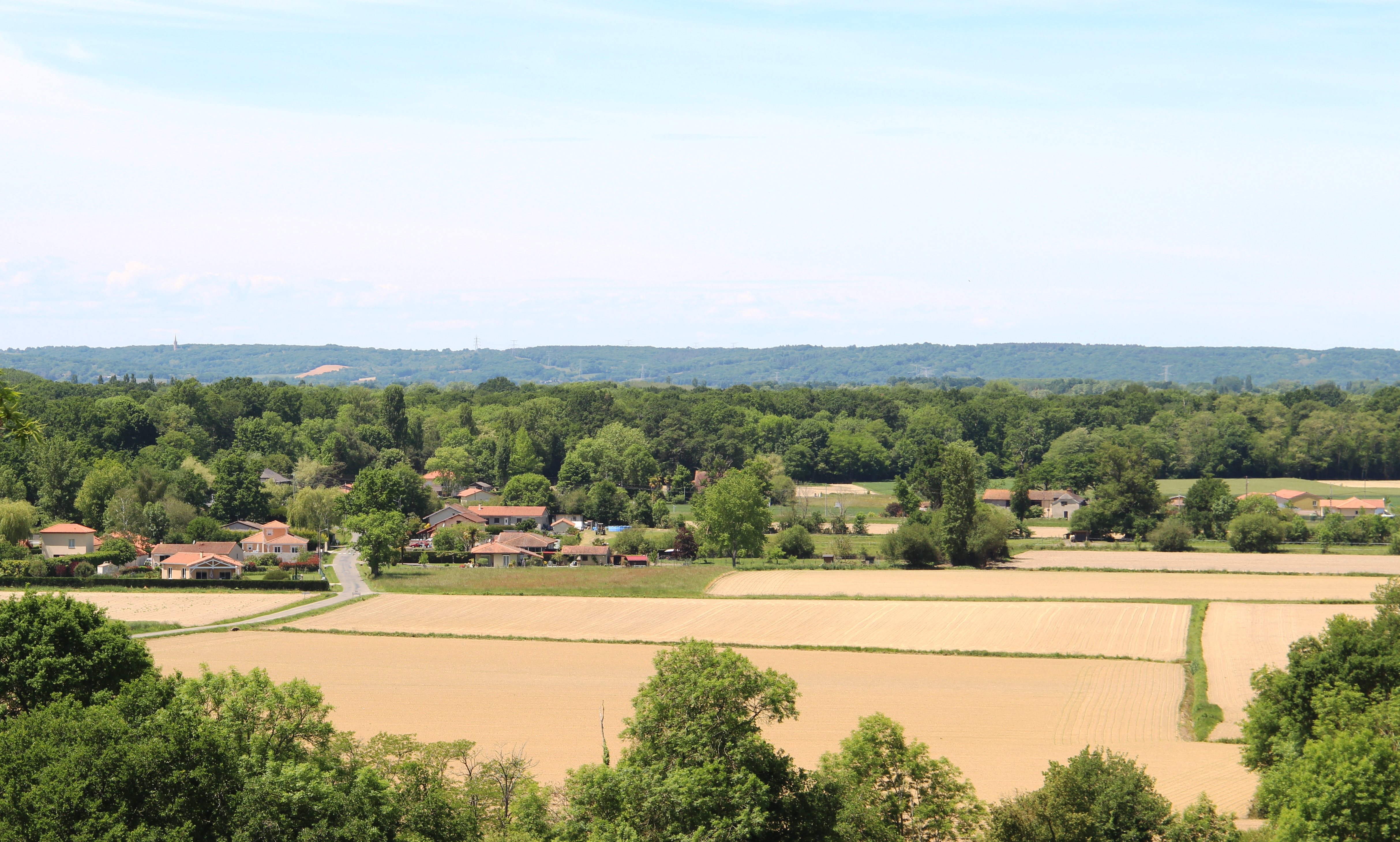 Escondeaux (Hautes-Pyrénées)